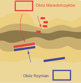 Bitwa pod Kynoskefalaj (197 pne)- 1 faza